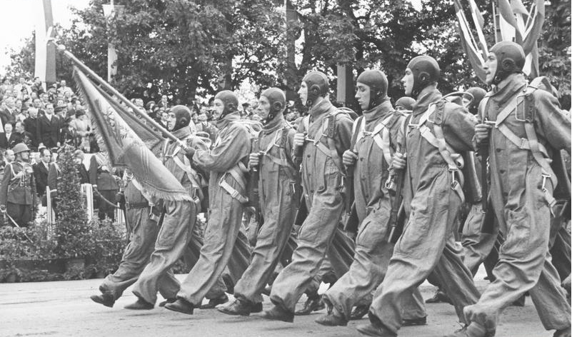 Uroczystości 3 Maja w Warszawie: Oddział skoczków spadochronowych LOPP